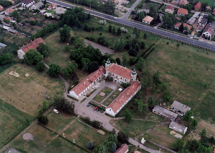 Palace - Pilis - Hungary - Europe